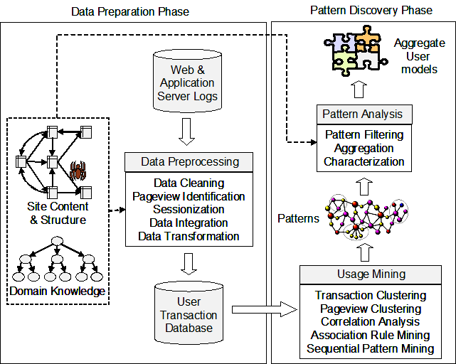 usage mining